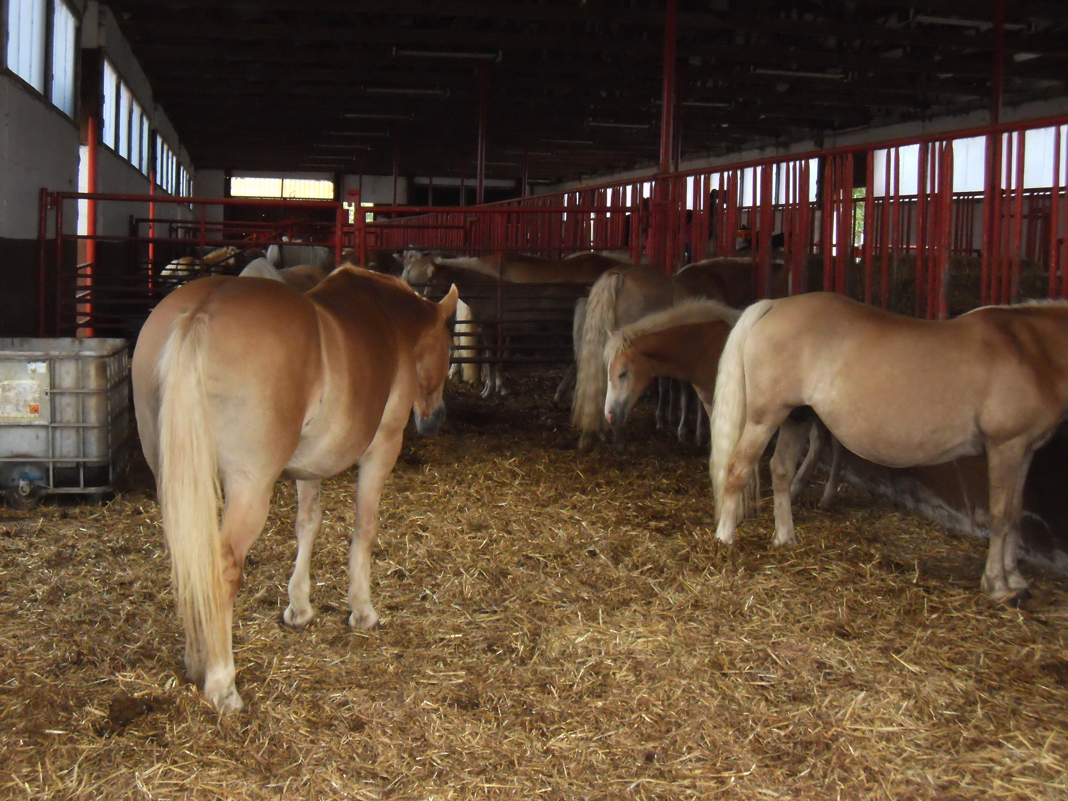 Edelbluthaflinger- und Haflingerstuten im Haflingergestüt Meura